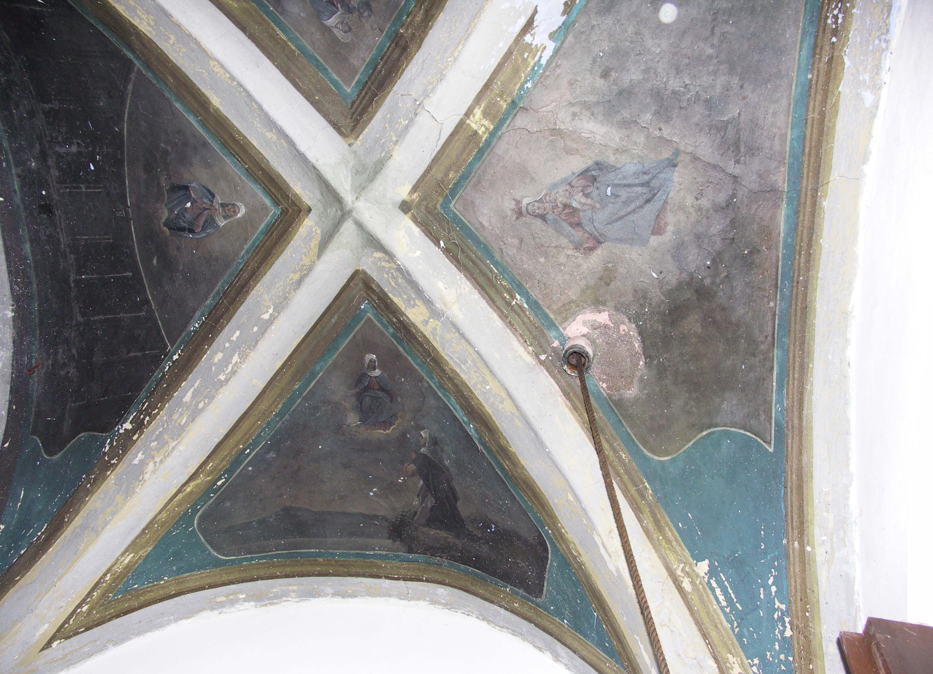 Kaplička Sejkorská (Bozkov), Cimbál, Bozkov, detail klenutého stropu s průchodem provazu k osluze zvonku